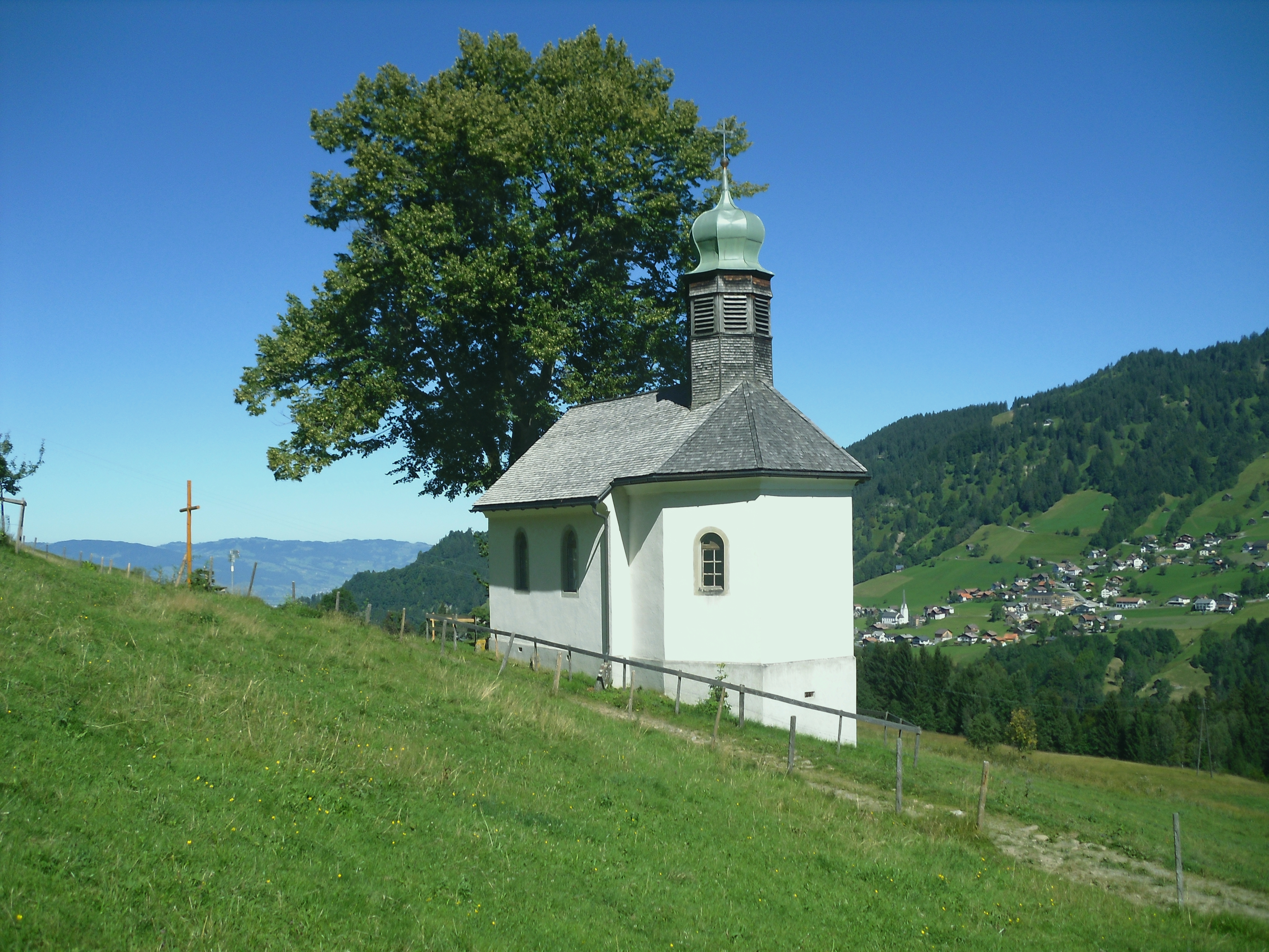 Kapelle Hl. Martin in Laterns (Wies)